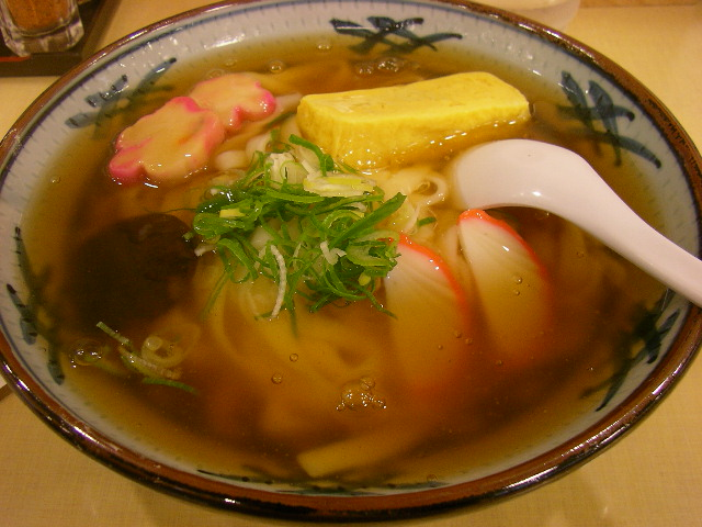 あんかけきしめん（名古屋市中村区名駅1-1-2、名古屋駅最寄り松坂屋7F、テルミナ「味の街」の、きしめん「よしだ」[1]直営のテルミナ店）